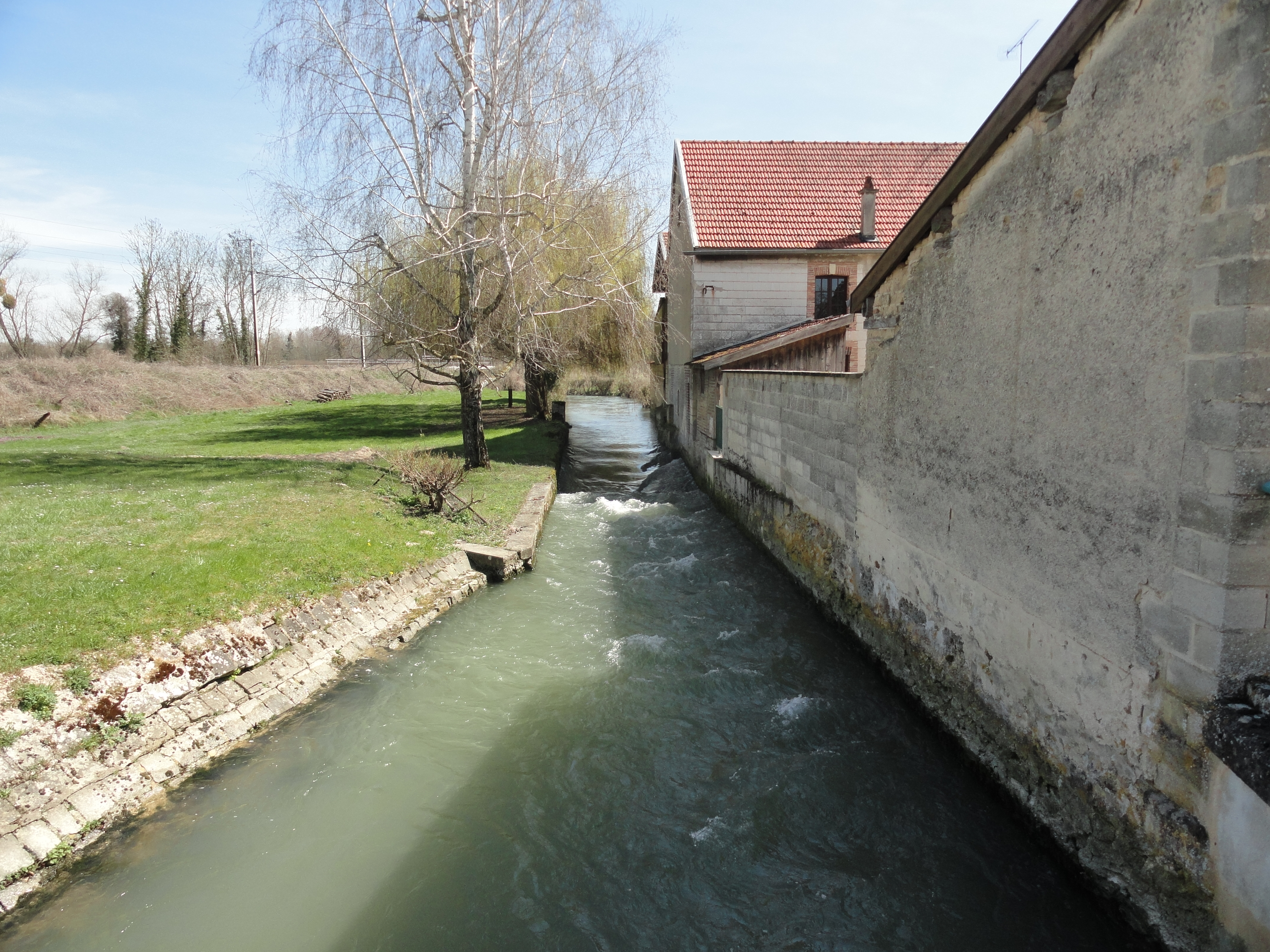 La rivière Les Tarnauds, vue depuis le petit pont la traversant au nord du village d'Athis.